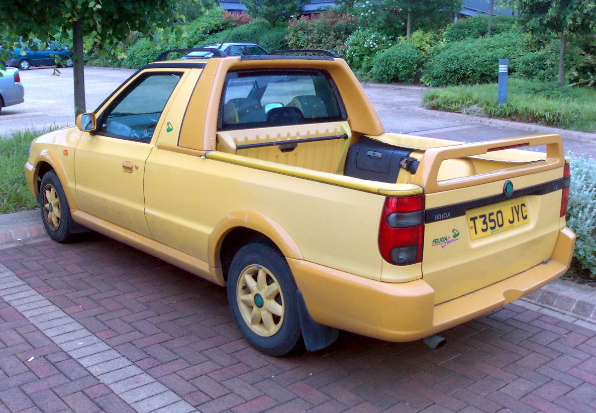 Škoda Felicia FunYellow